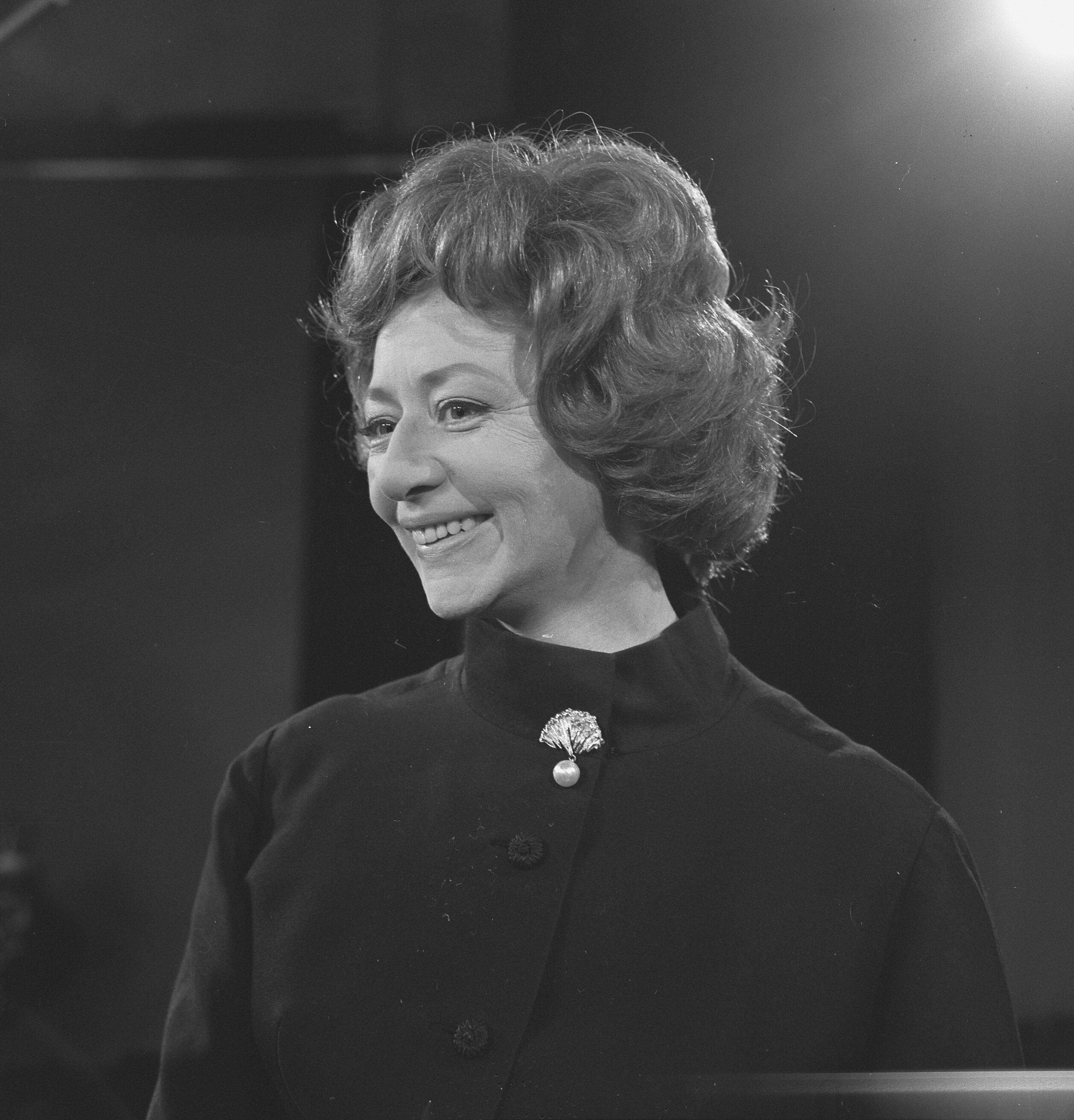 Collectie / Archief : Fotocollectie Anefo Reportage / Serie : [ onbekend ] Beschrijving : Das Kommödchen (Duits cabaretgezelschap uit Düsseldorf) in Nederland, Lore Lorentz tijdens de TV-opname Datum : 26 mei 1966 Locatie : Nederland Trefwoorden : cabaret, cabaretgezelschappen, cabaretiers Persoonsnaam : Lorentz, Lore Fotograaf : Evers, Joost / Anefo Auteursrechthebbende : Nationaal Archief Materiaalsoort : Negatief (zwart/wit) Nummer archiefinventaris : bekijk toegang 2.24.01.03 Bestanddeelnummer : 919-1960